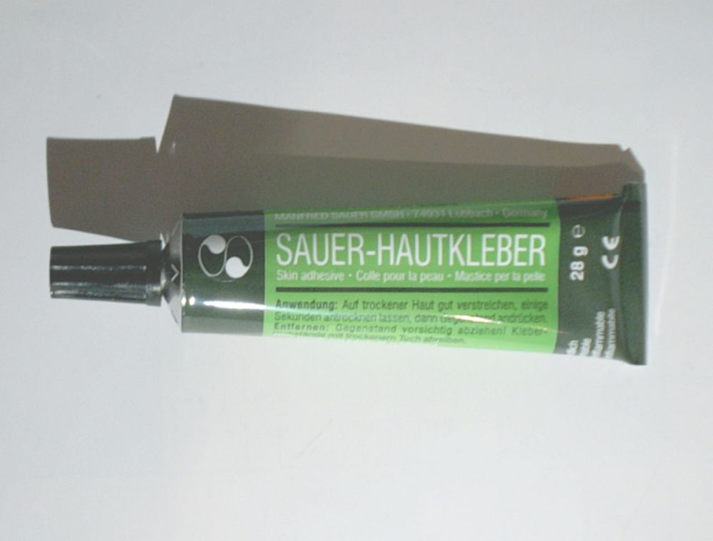 Hautkleber für Kondomurinale bei Harninkontinenz.